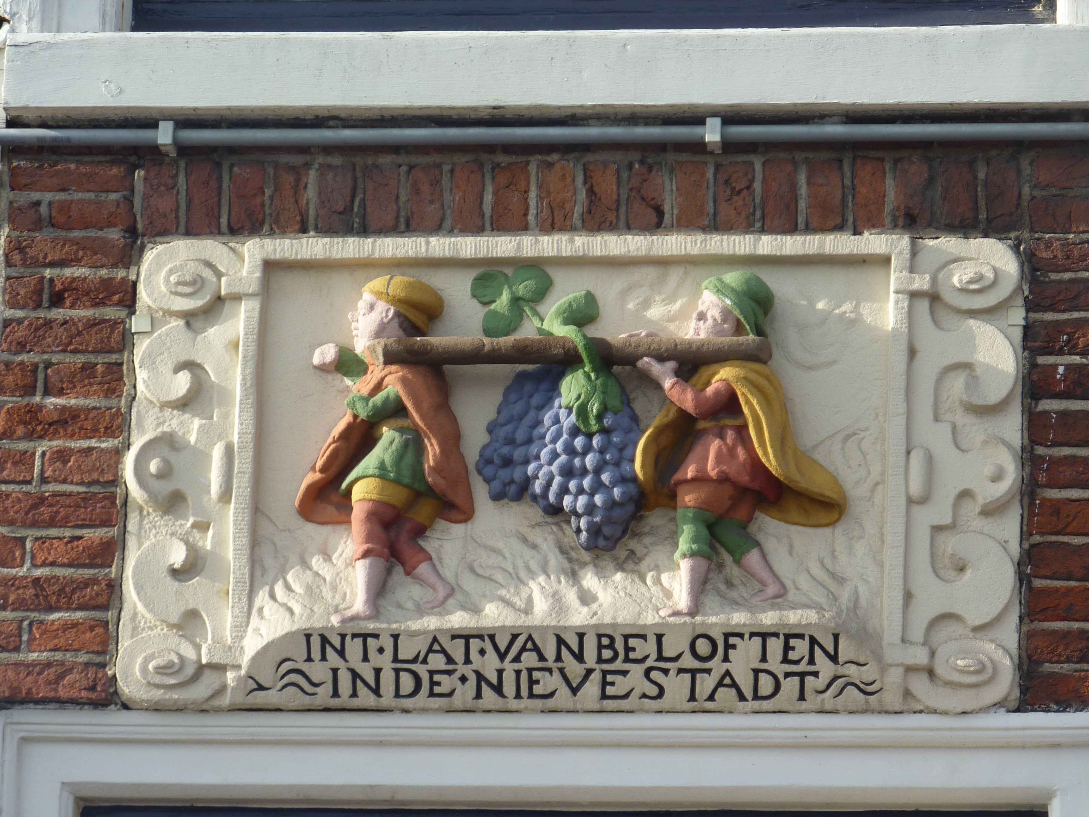 Leiden - Beestenmarkt 14 - gevelsteen - RM2455. The inscription reads: int la[n]t van beloften - in de nieue stadt. Translates as: In the land of promises - in the new town.